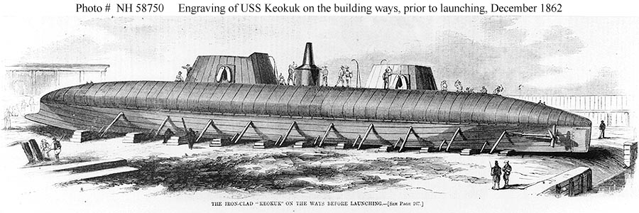 USS Keokuk